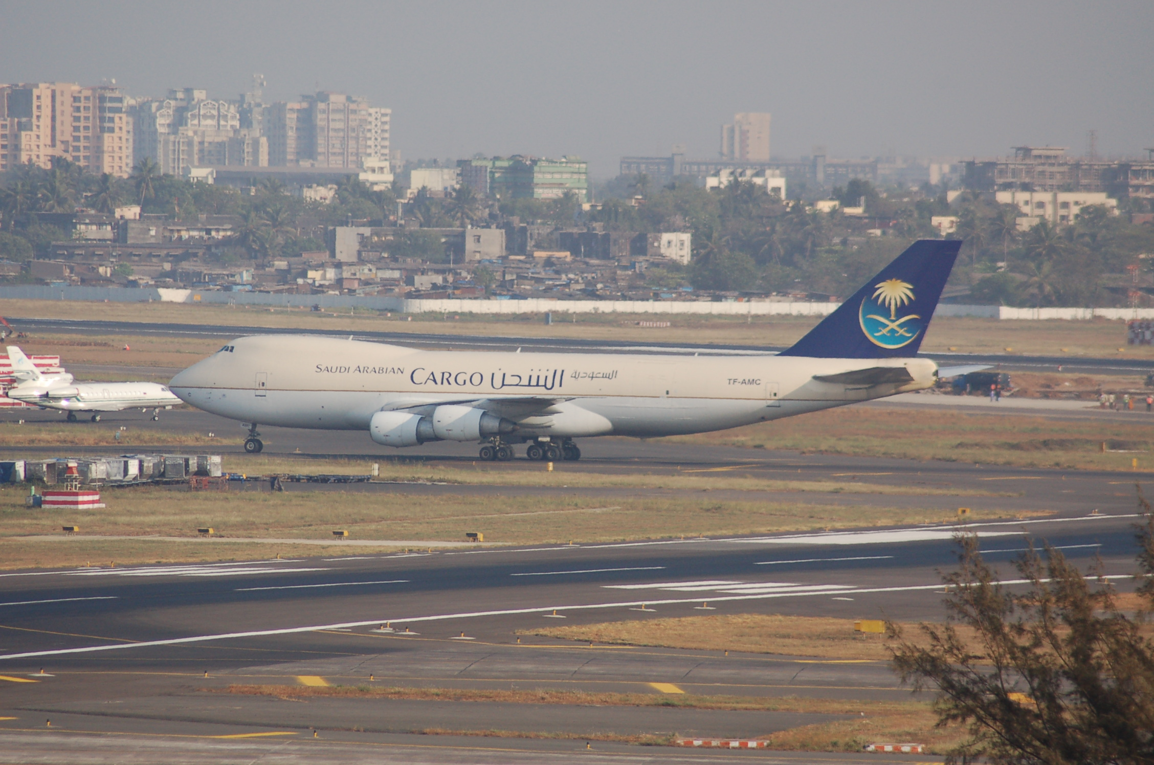 Boeing 747/2F of Saudi Arabian Cargo at Mumbai, (Chhatrapati Shivaji,) - BOM, India,10/02/07.